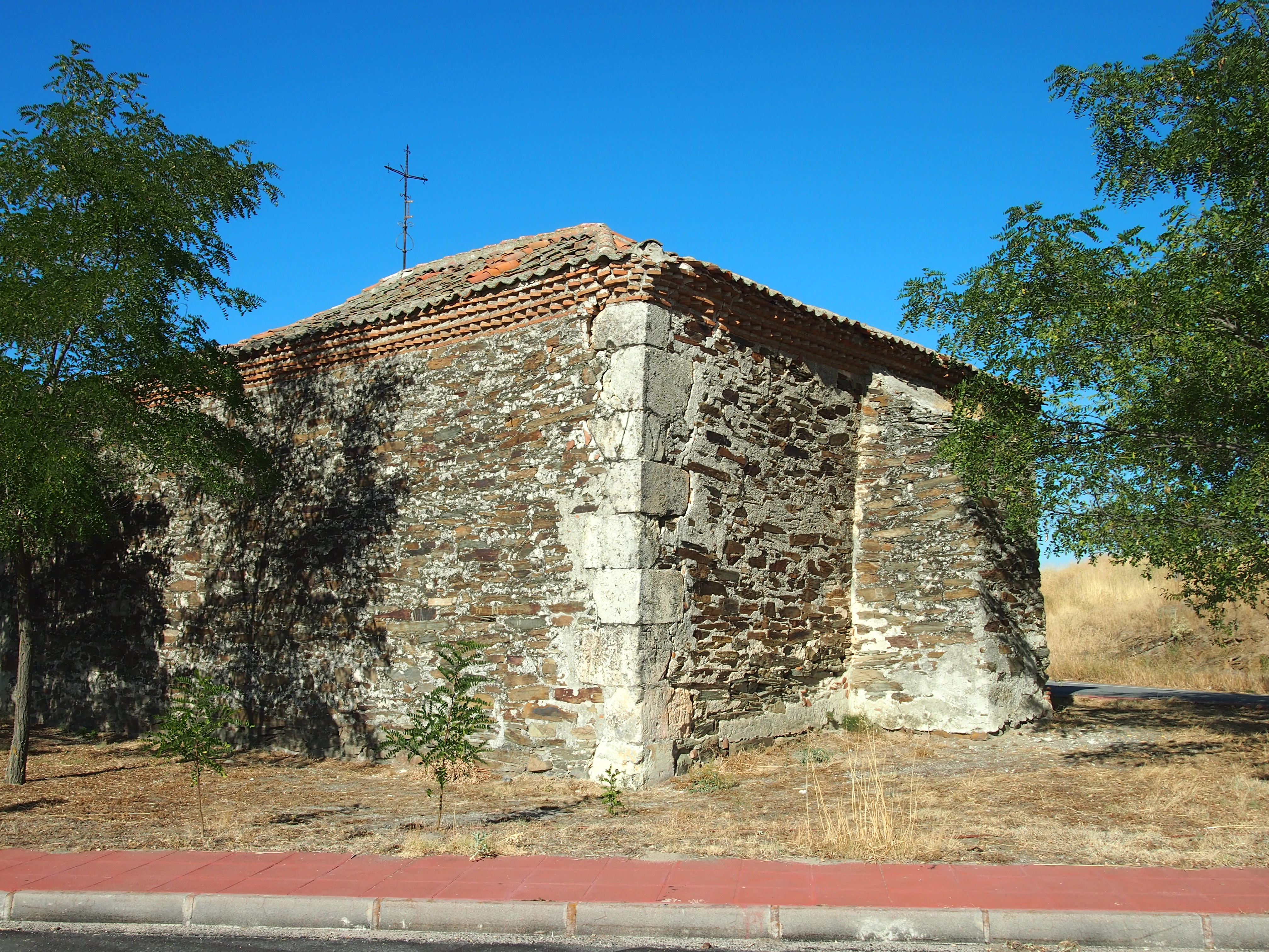 Vista trasera de la ermita del Humilladero en Bernardos, Segovia (España).